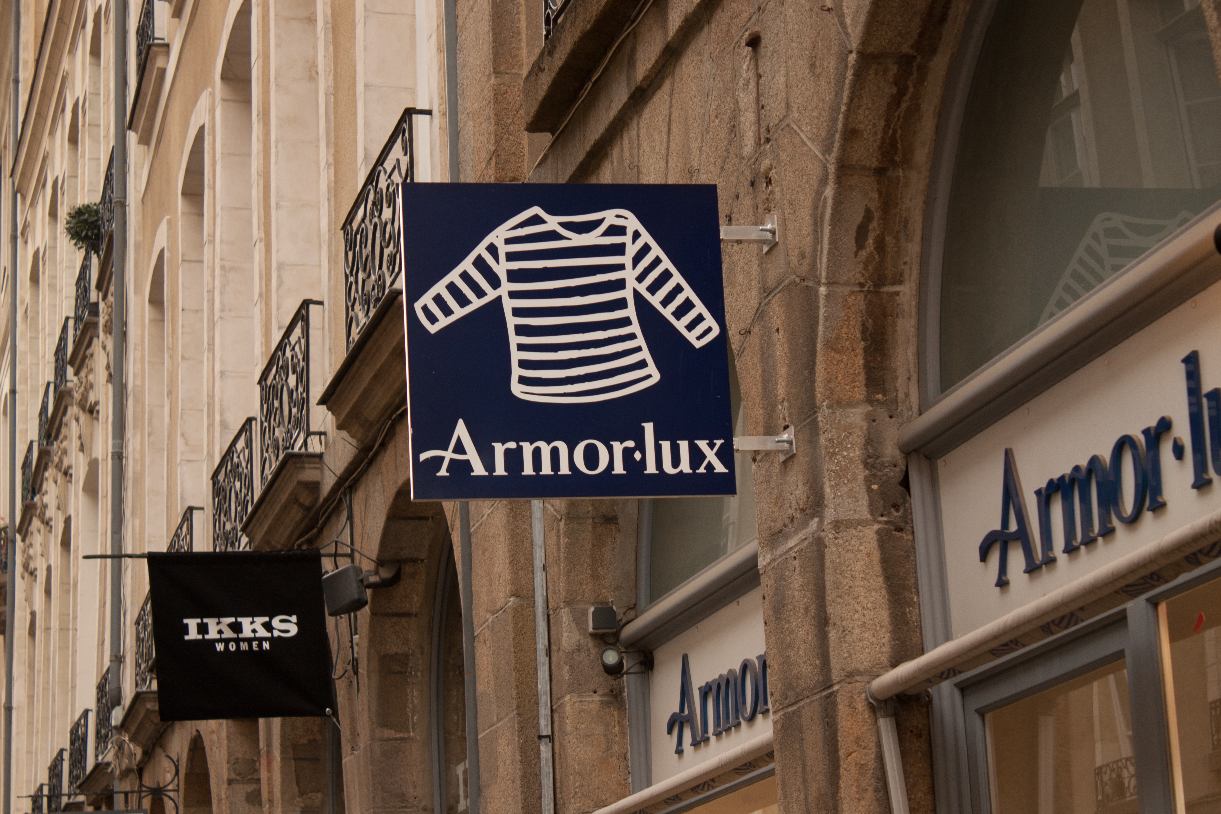 Boutique des marinières Armor-Lux à Rennes